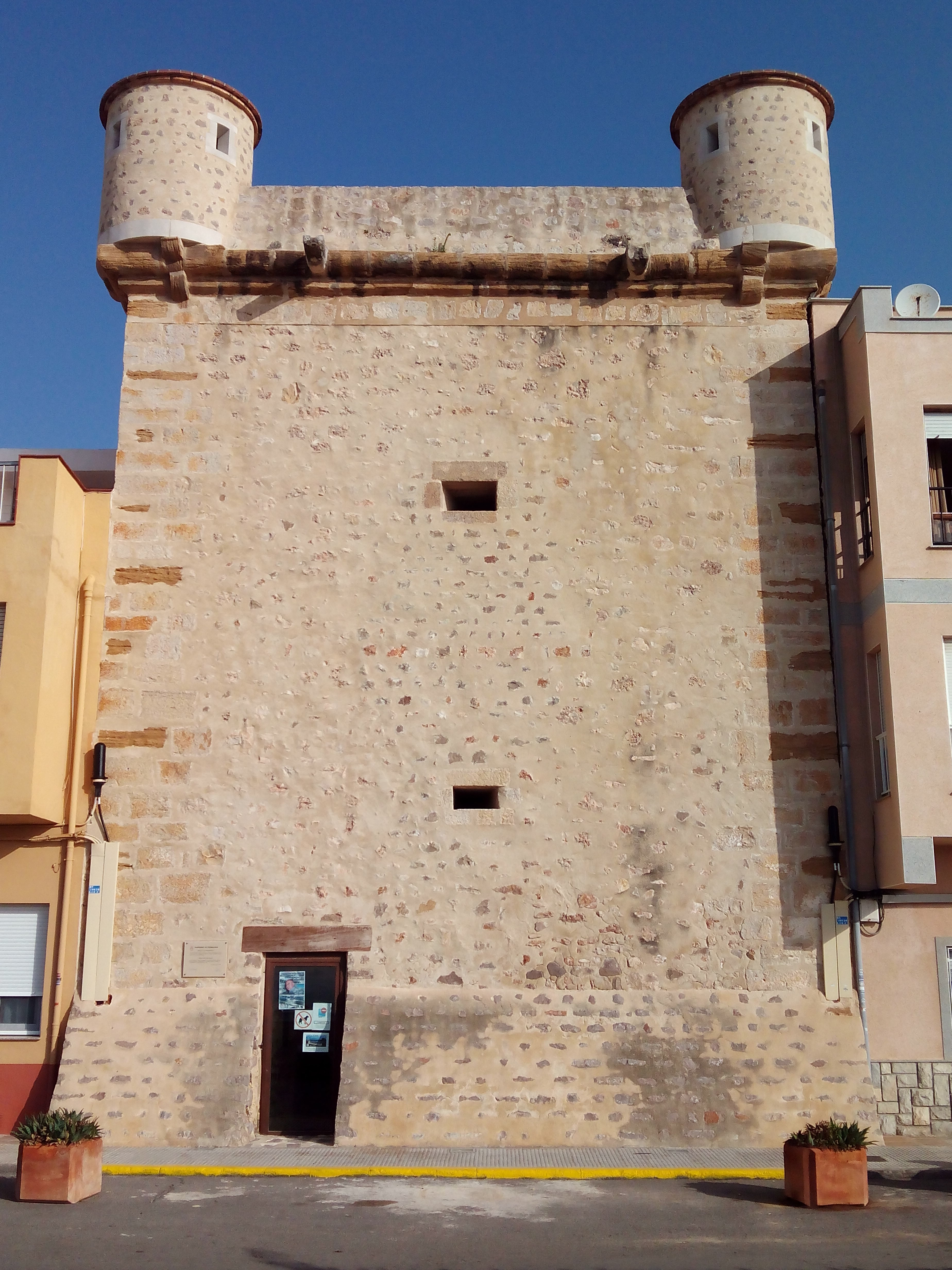 Zelatari-dorrea